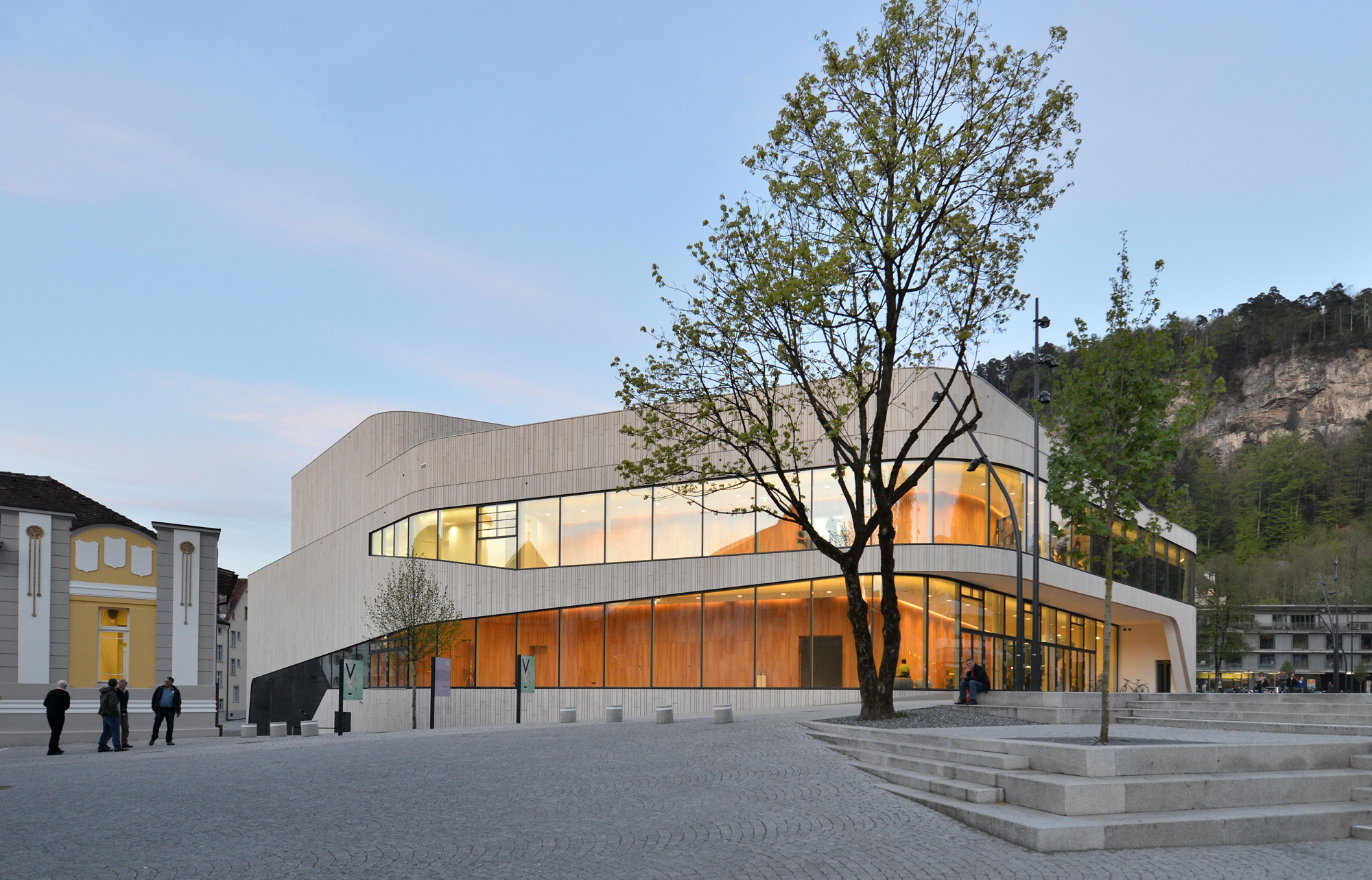 Das Kultur Kongresszentrum Montforthaus [1] in Feldkirch wurde nach Plänen von Hascher Jehle Architektur 2014 fertiggestellt und am 2. Januar 2015 feierlich eröffnet.